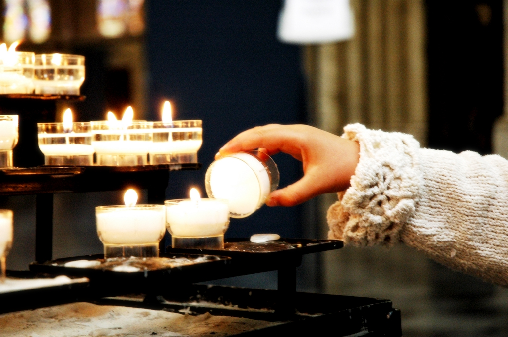 Kaarsje branden in Sint Michiels en Goedele Kathedraal